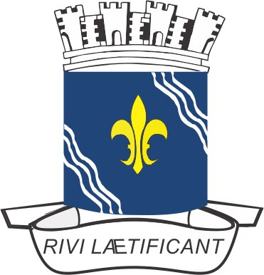 Criado pela Lei Municipal nº 92, 10 de Abril de 1970, trás como lema Rivi Laetificant